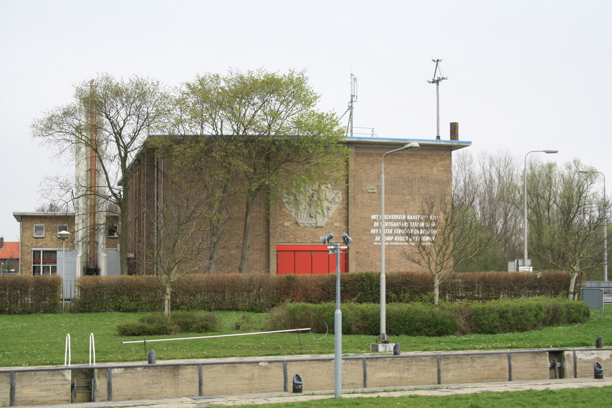 Gemaal Wortman in Lelystad